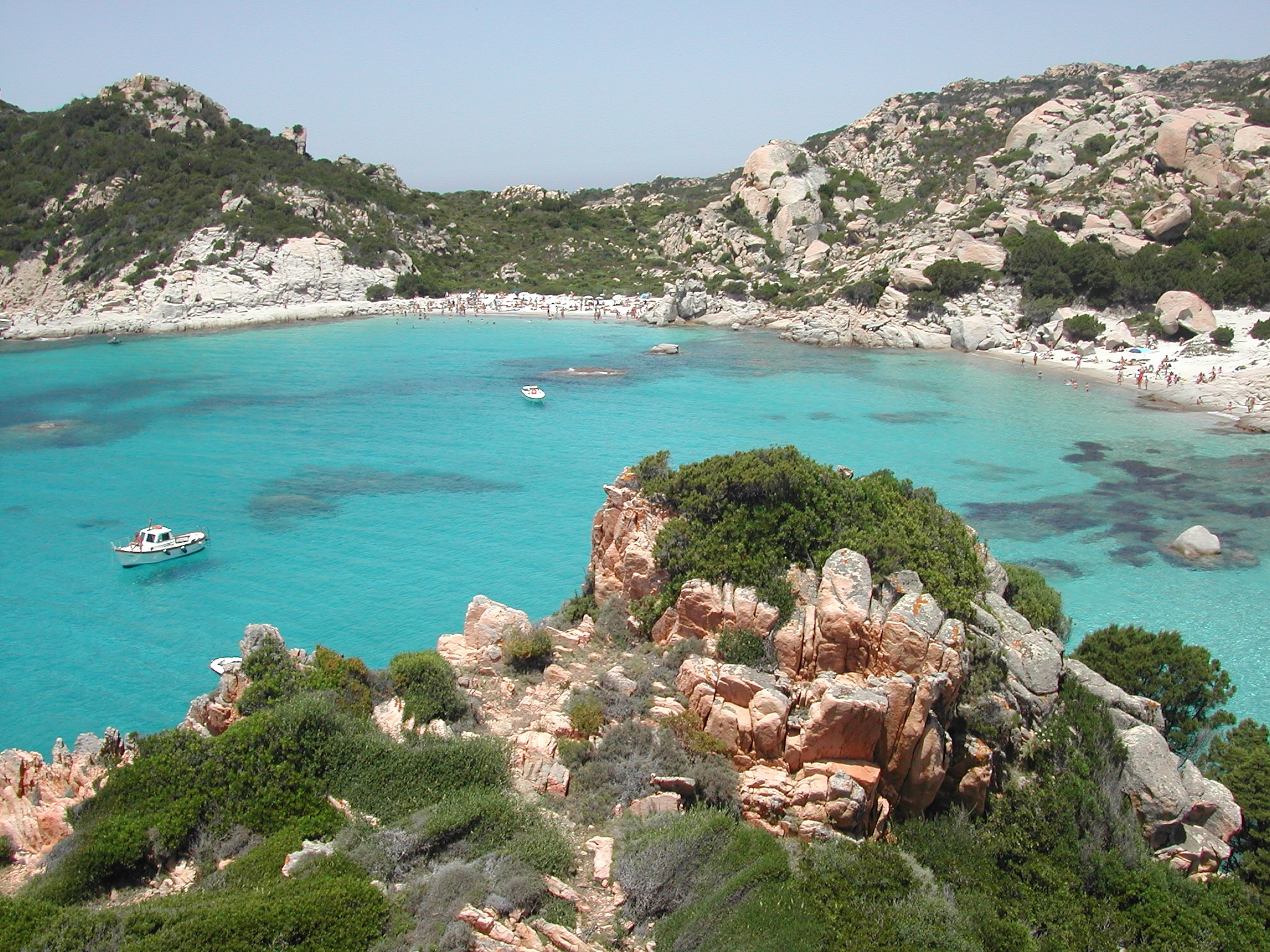 Il mare dell'Isola di Spargi